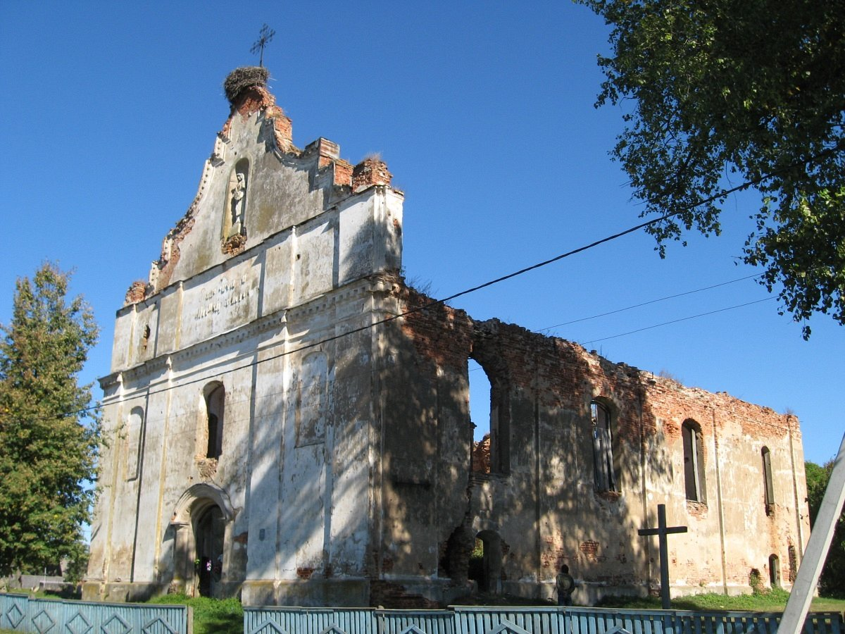 Зембін. Руіны касцёла